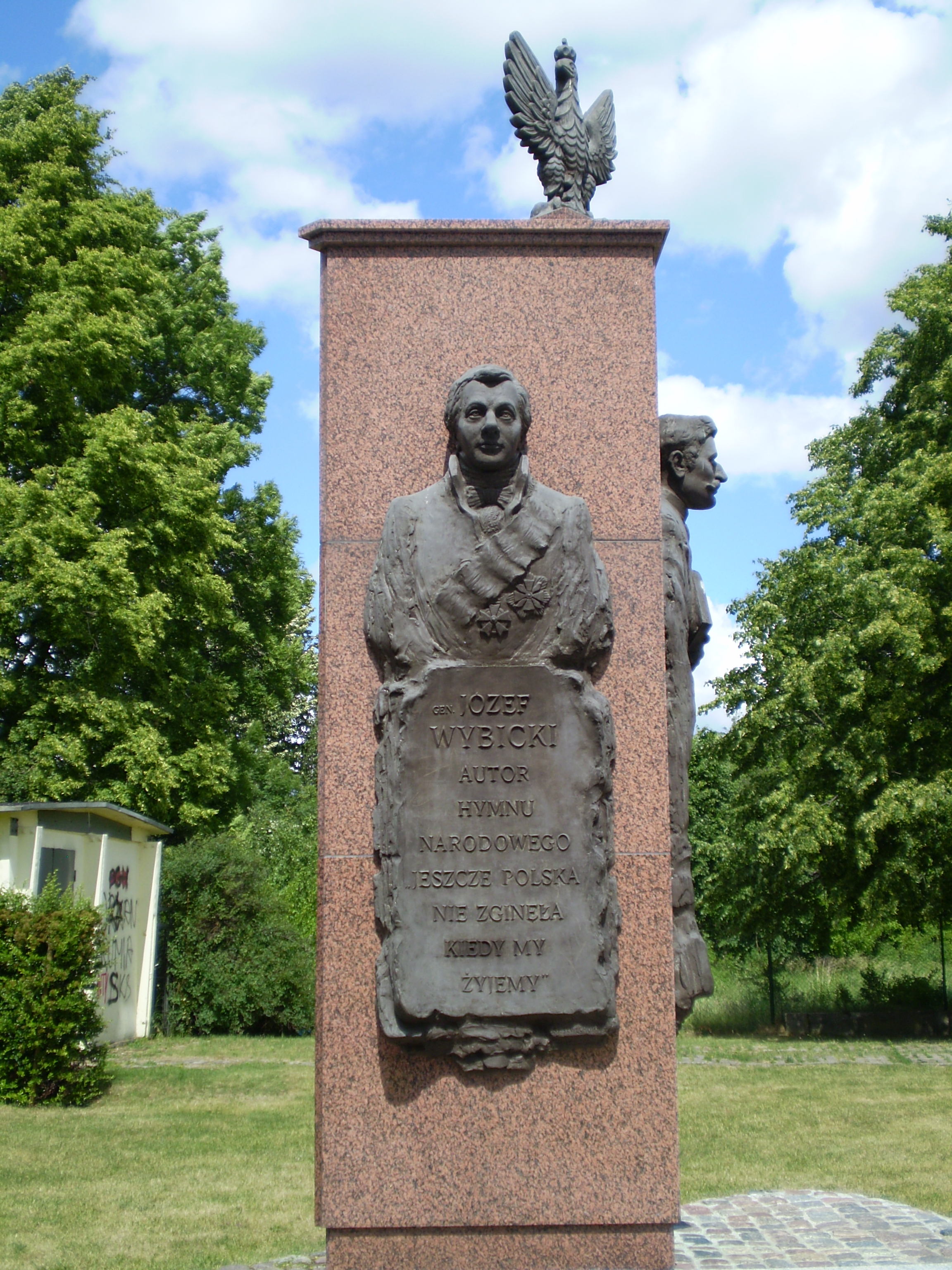 I find this in 84-230 RUMIA(PL)in a corner of a little park